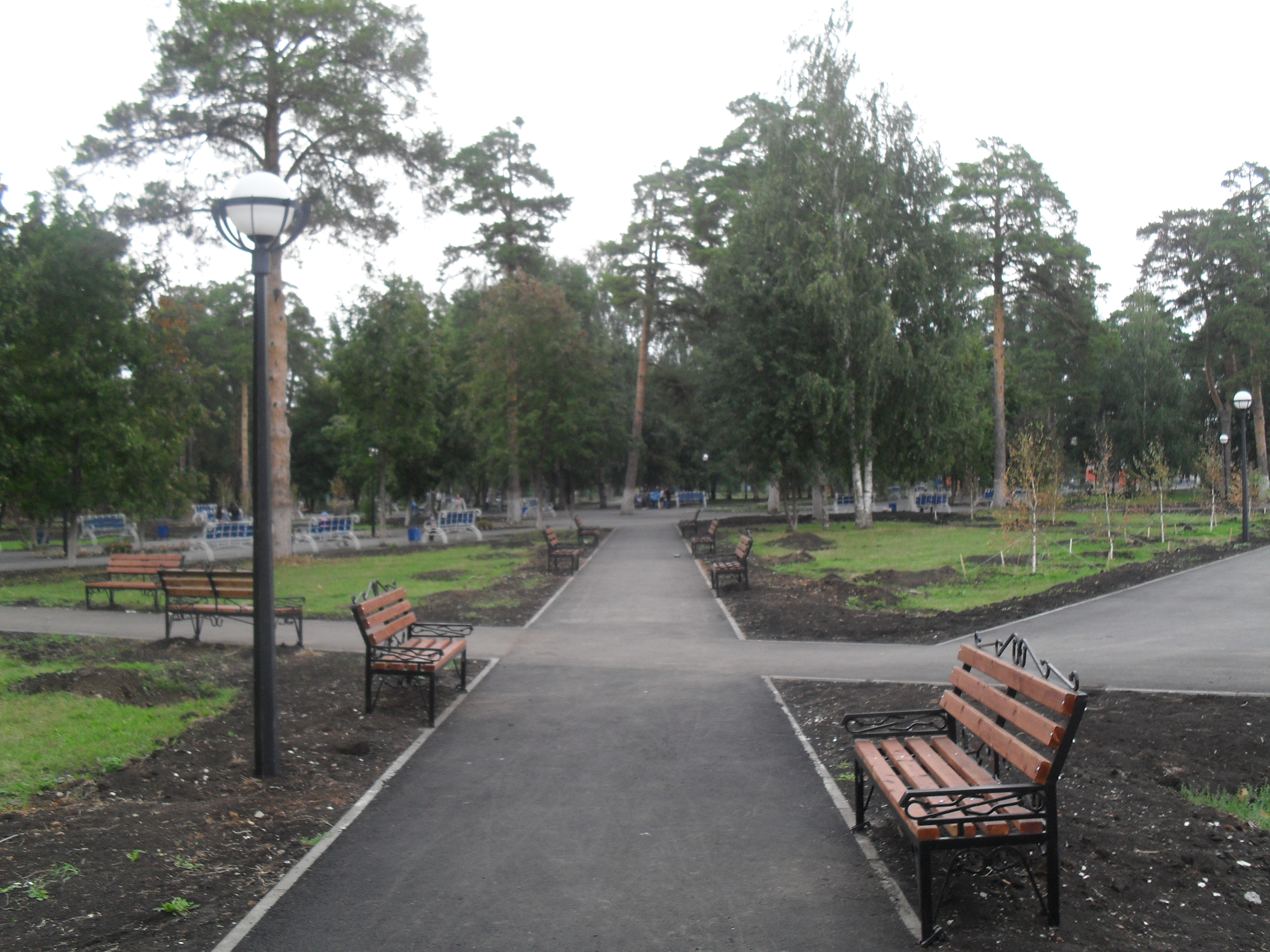 Аллеи Скарятинского сада г.Чистополь